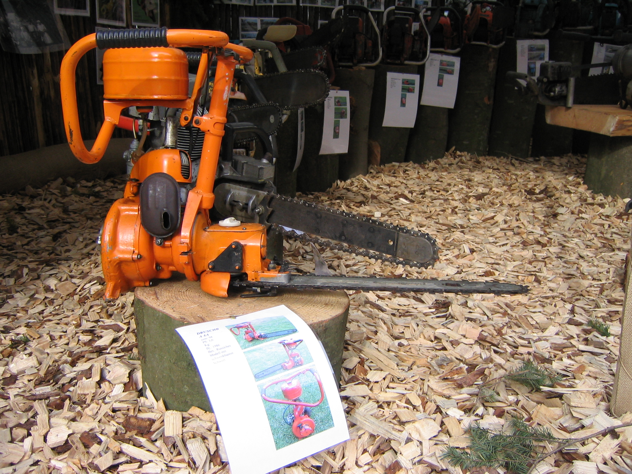 Kettensäge von Druschba auf dem Festival Staufen Stages am Stand der Klaus Bärmann GmbH